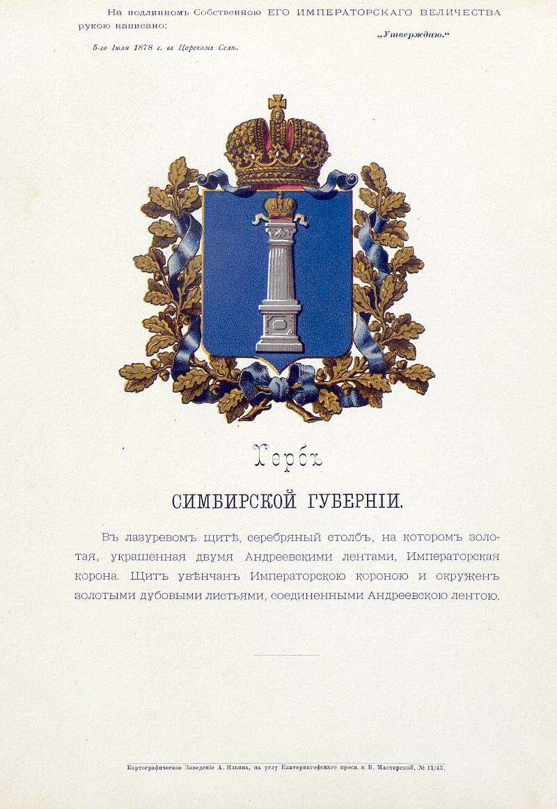 Official Russian Empire coat of arms Simbirsk Governorate. Герб Российской Империи Симбирской губернии с официальным описанием в Гербовнике Бенке. Утверждён Императором Всероссийским Александром Вторым.